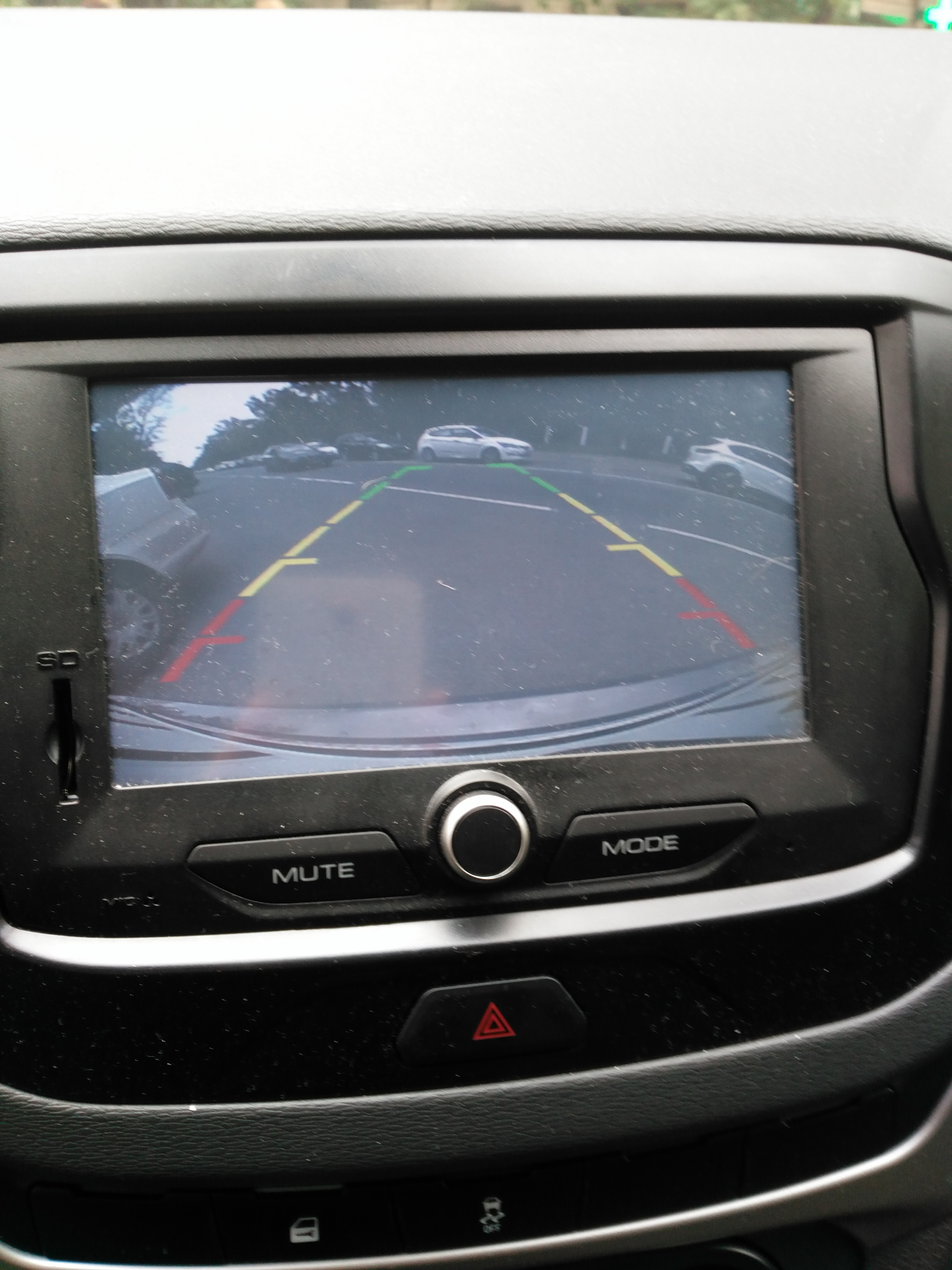 Lada Vesta. Камера заднего обзора.